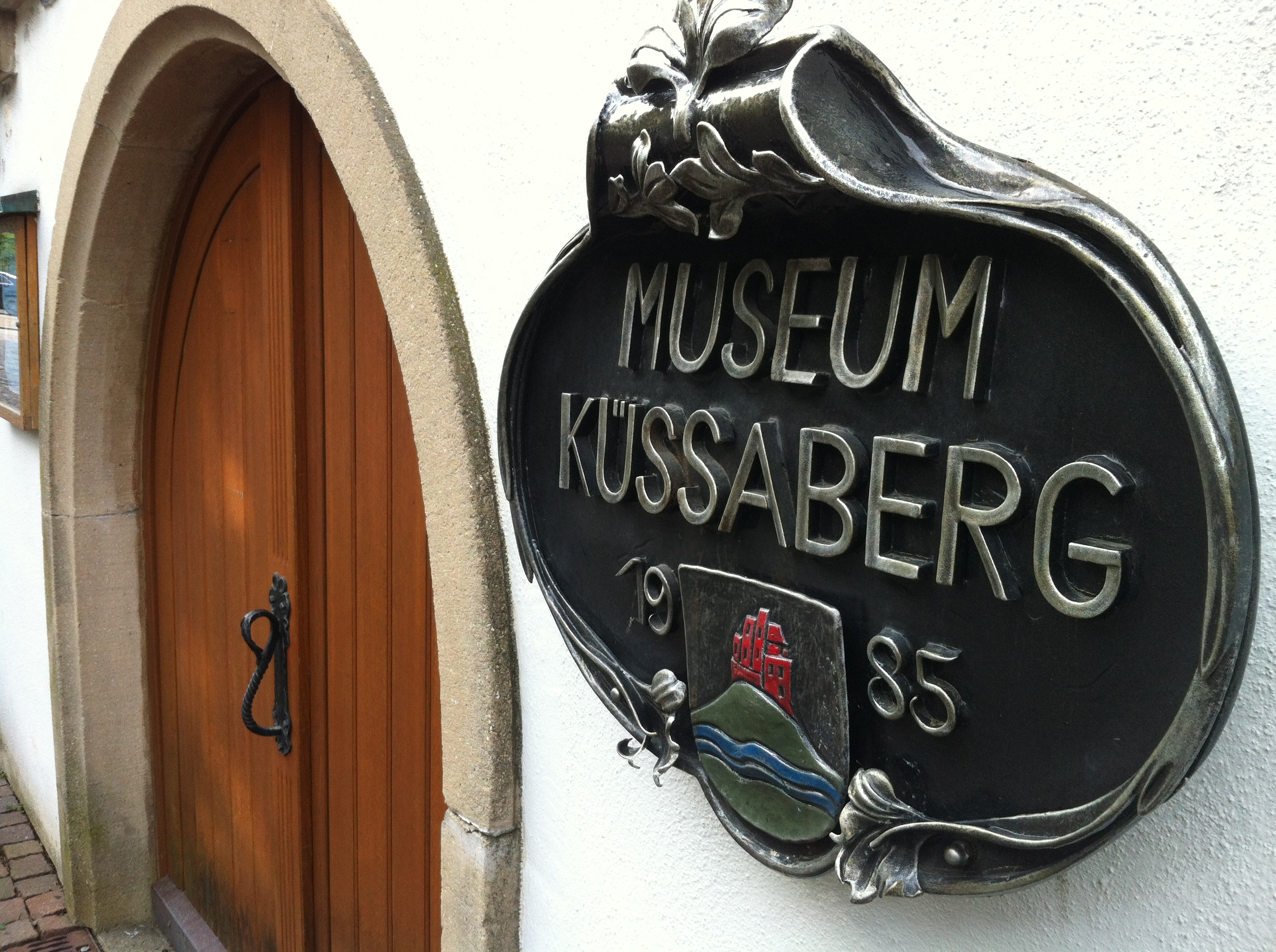 Küssaberg, Gemeinde im Landkreis Waldshut in Baden-Württemberg. Eingangsbereich des Museum Küssaberg im Kaiserlichen Jagdhaus zu Rheinheim.